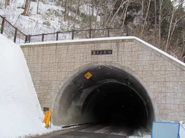 上高地の入り口、釜トンネルの上高地側出口（冬季閉鎖中）